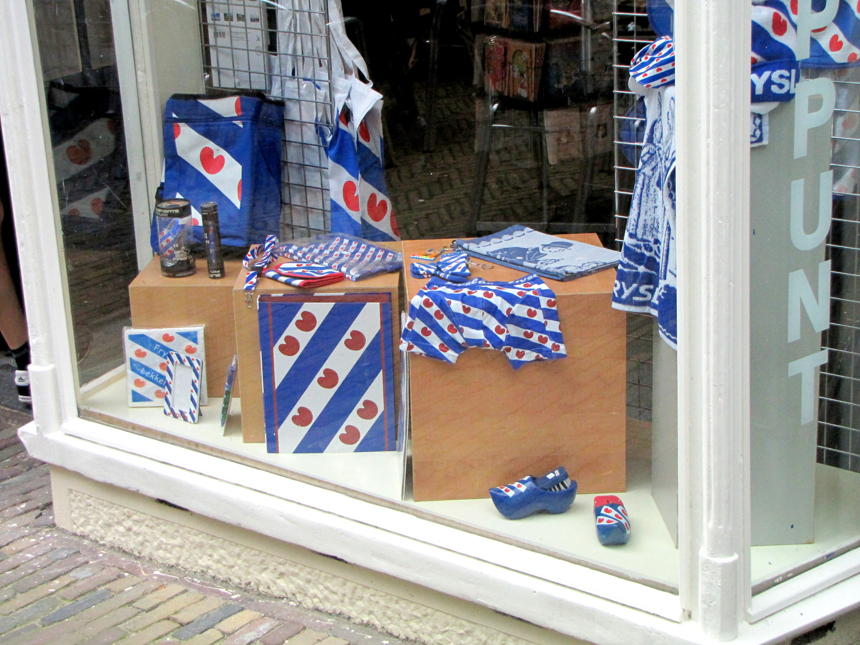 Winkel in Sneek met Friese memorabilia.